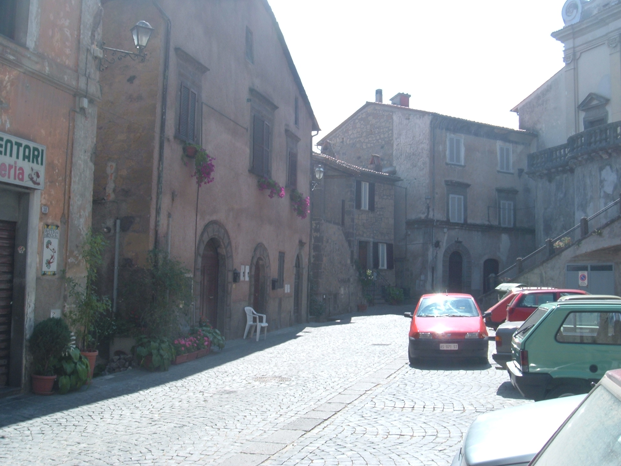 Via Cavour, una strada del centro storico di Gradoli